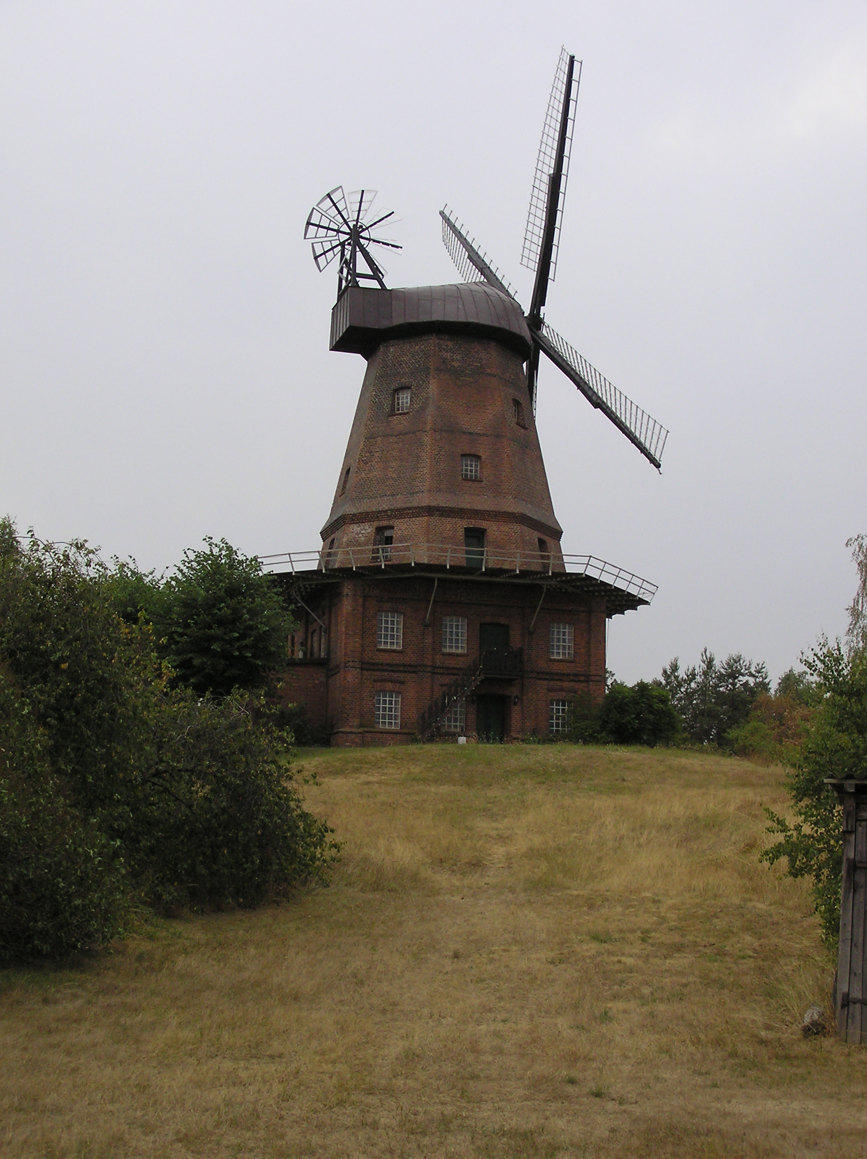 Windmill Hittbergen,NS,Germany